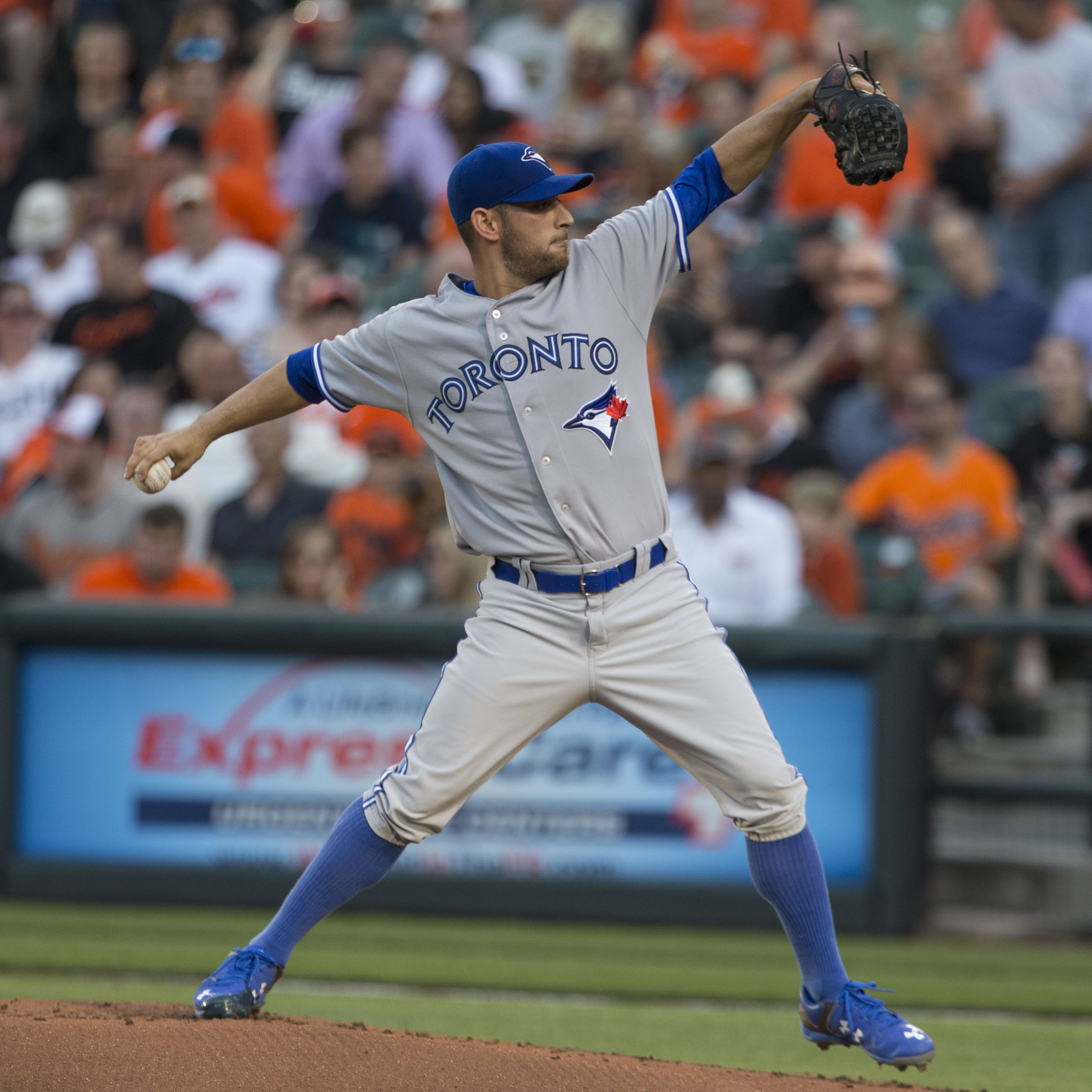 Marco Estrada